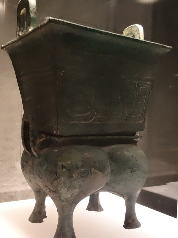 波曲纹铜方甗，河南博物院藏，青铜分体甗，西周文物，1990年三门峡市虢国墓地M2001出土。